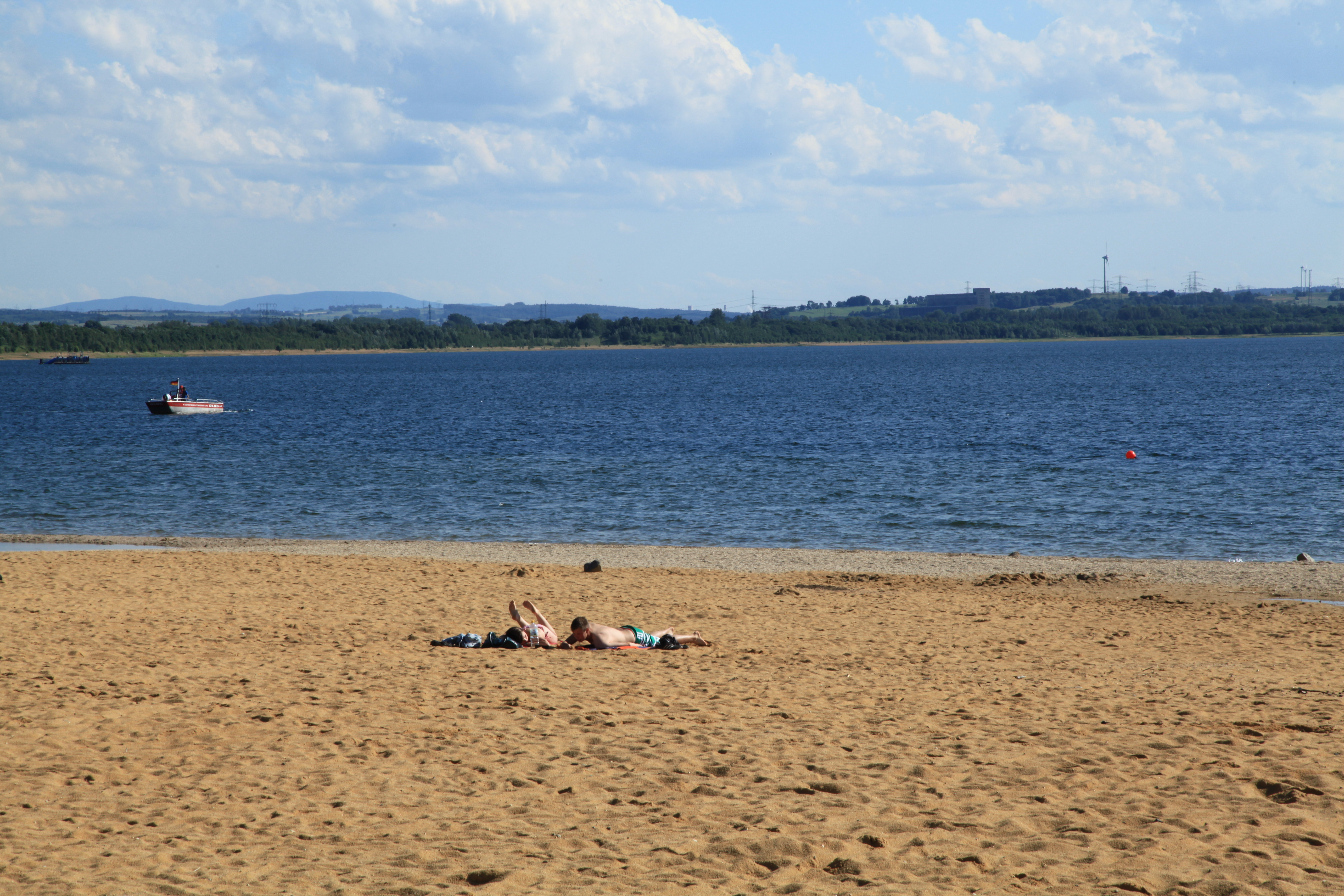 Berzdorfer See am Weinhübler Seeweg, Deutsch Ossig in Görlitz